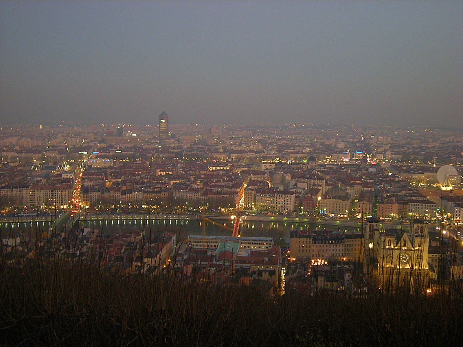 Lyon